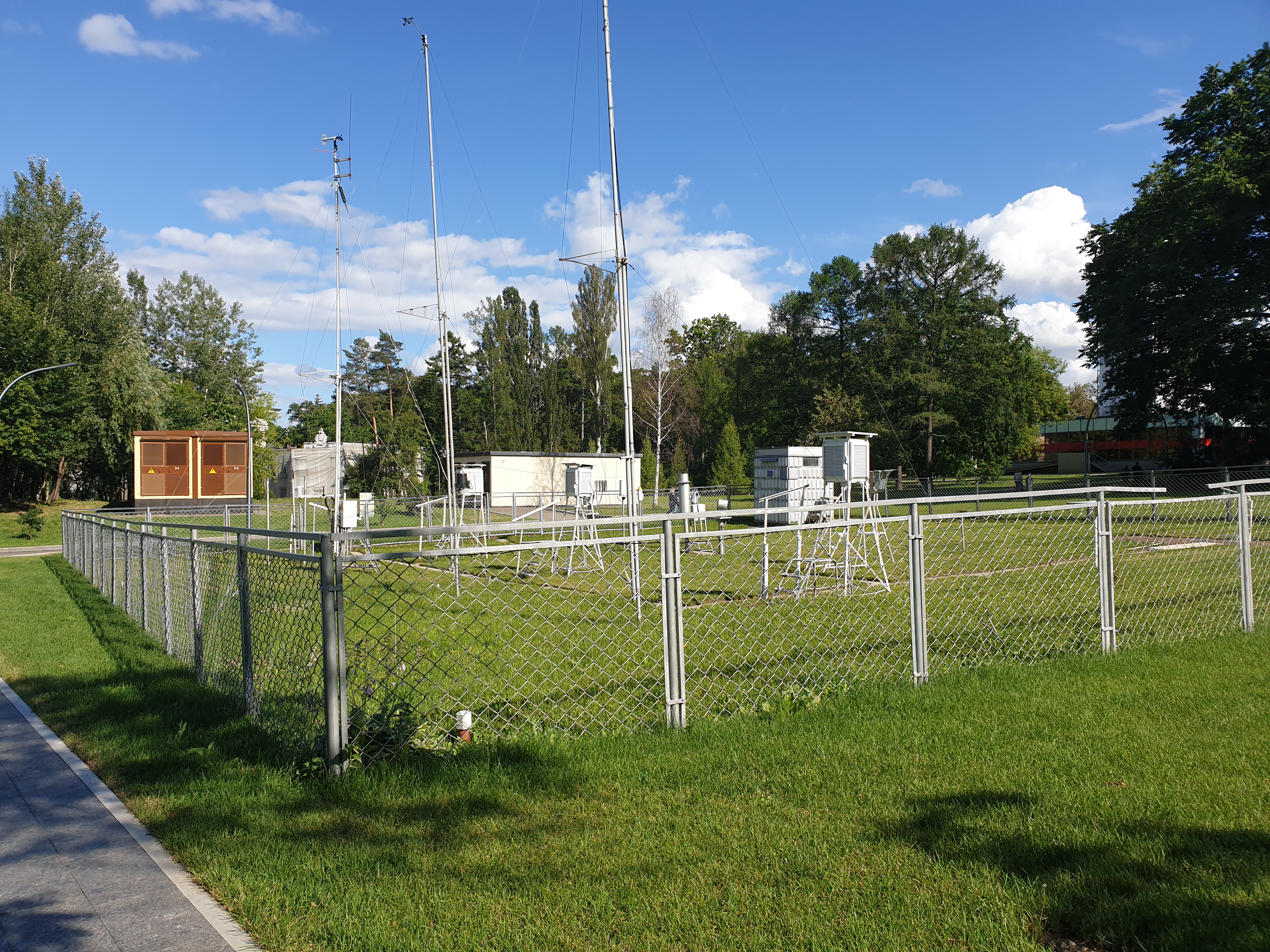 Вид на метеостанцию ВДНХ (Москва) 7 июля 2019 г. (направление съемки - юго-восток)